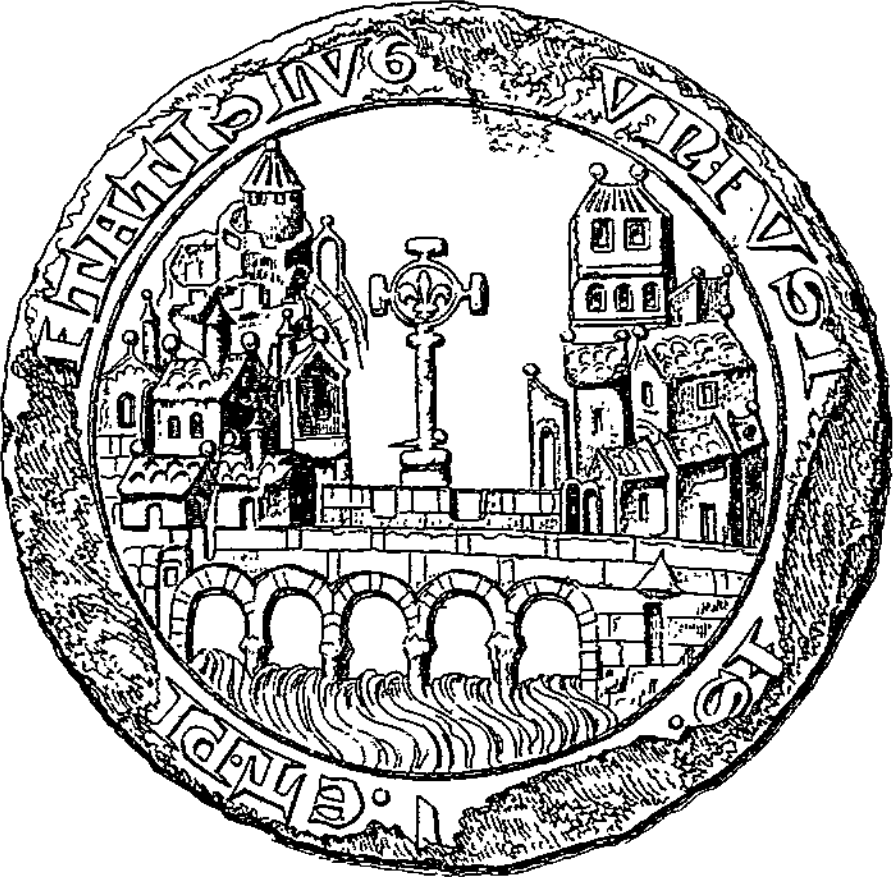 Sceau de Lyon en 1271 extrait du Cartulaire de Villeneuve